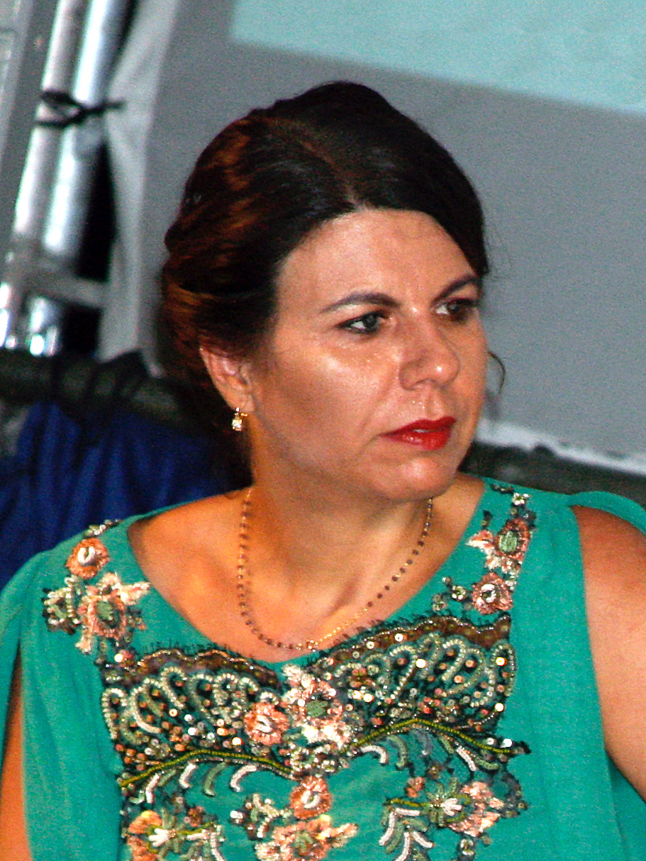 Geppi Cucciari al festival letterario "Sulla terra leggeri".